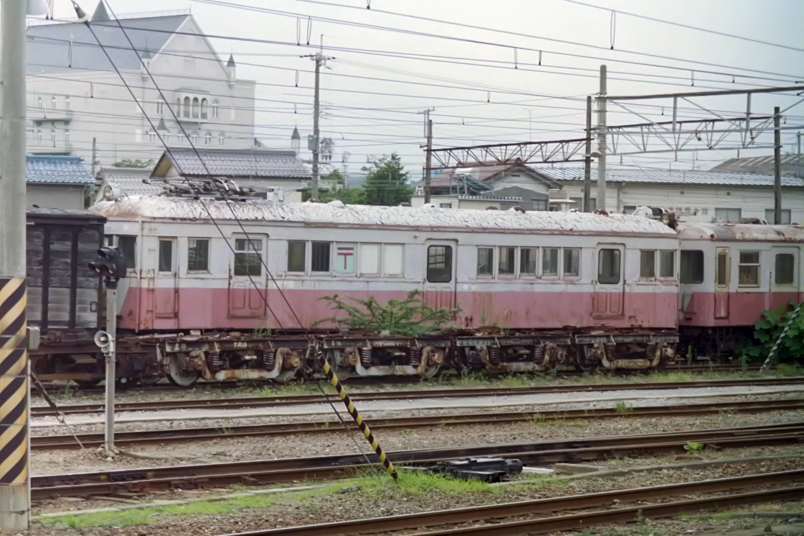 近江鉄道 モユニ10 彦根駅